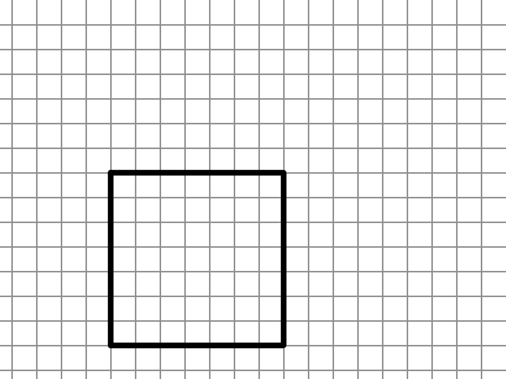 الخطوة الأولى: رسم الوجه الأمامي